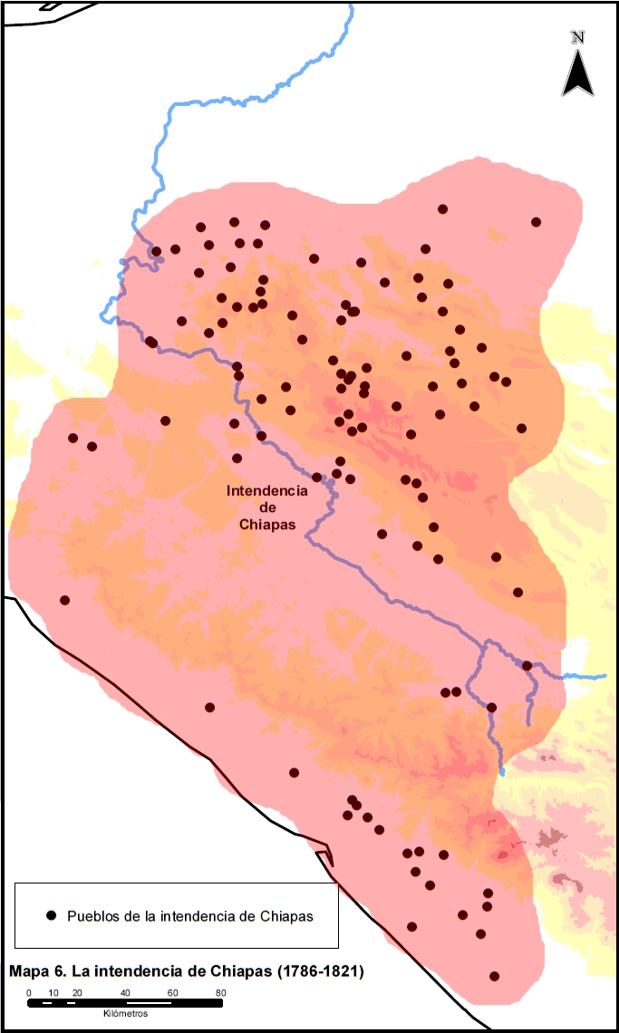 Representación de la intendencia de Chiapas en los siglos XVIII y XIX